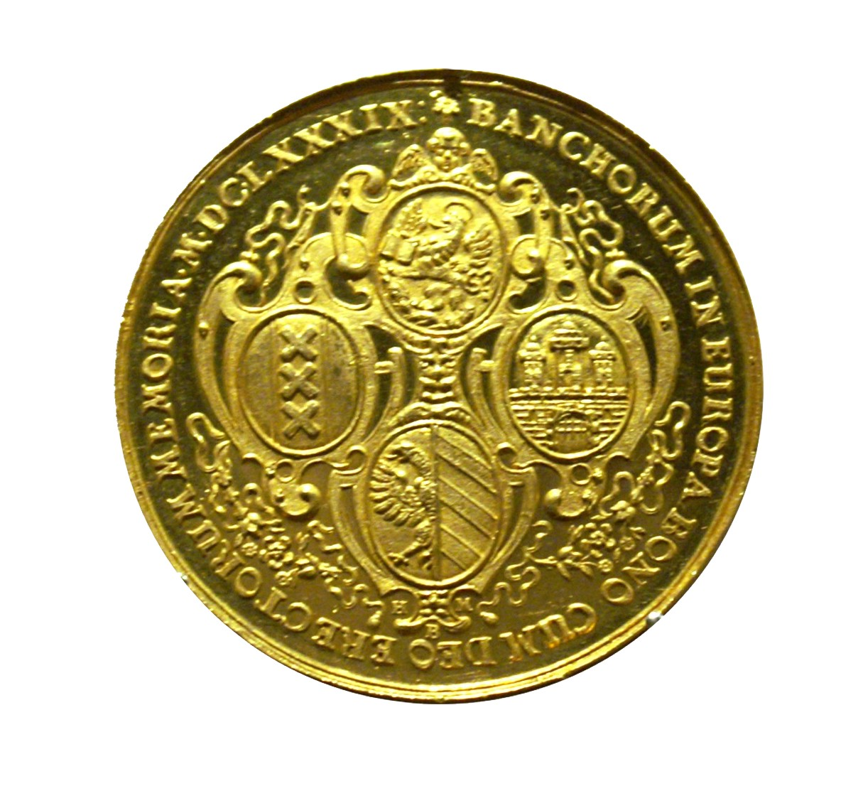 Goldener doppelter Bank-Portugaleser, 60g, 1665, Auf die vier Bankstädte: Venedig, Amsterdam, Nürnberg, Hamburg